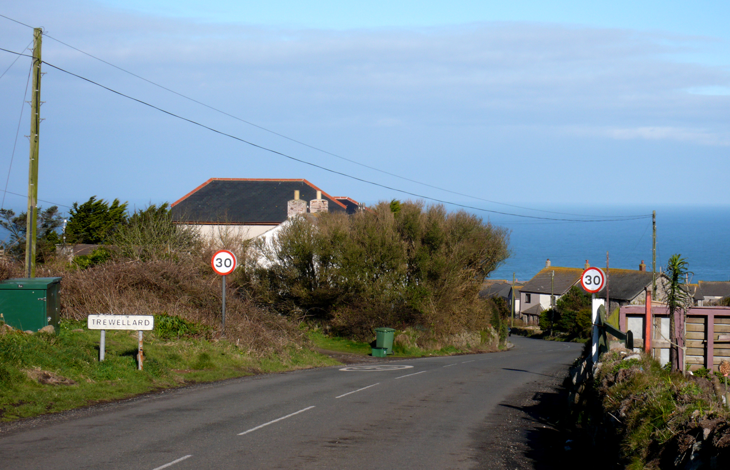 Trewellard Cornwall